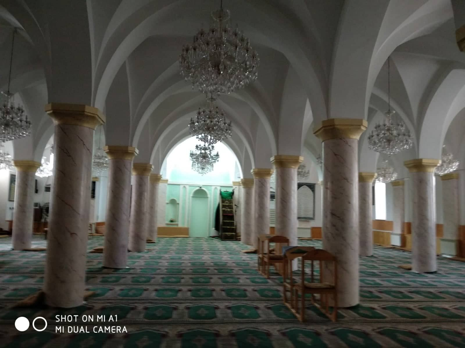 Maştağa Cümə məscidinin içəri görünüşü